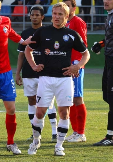 Сергей Коровушкин в составе ФК "Нижний Новгород" в 2011 году